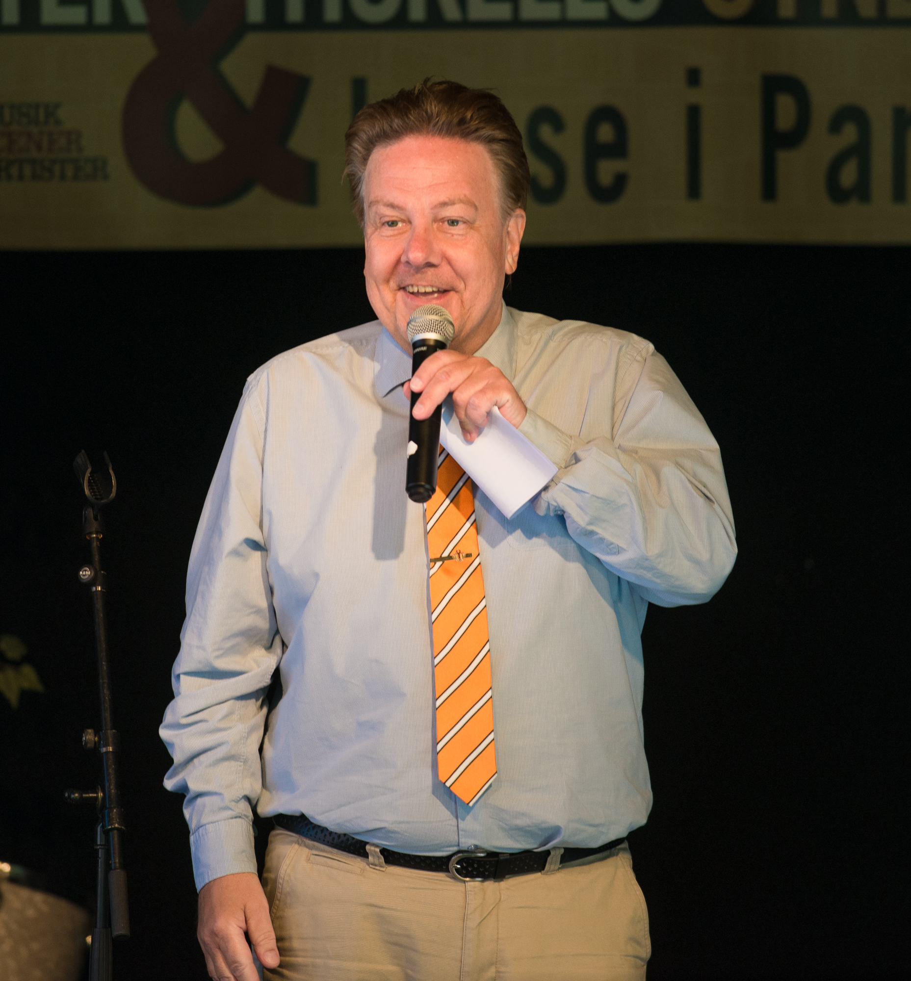 Anders Eldeman under utdelandet av Karamellodiktstipendiet den 9 juni 2018 på Lasse i Parken på Söder i Stockholm.